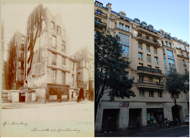 Illustre l'évolution du bâti, déstruction puis reconstruction